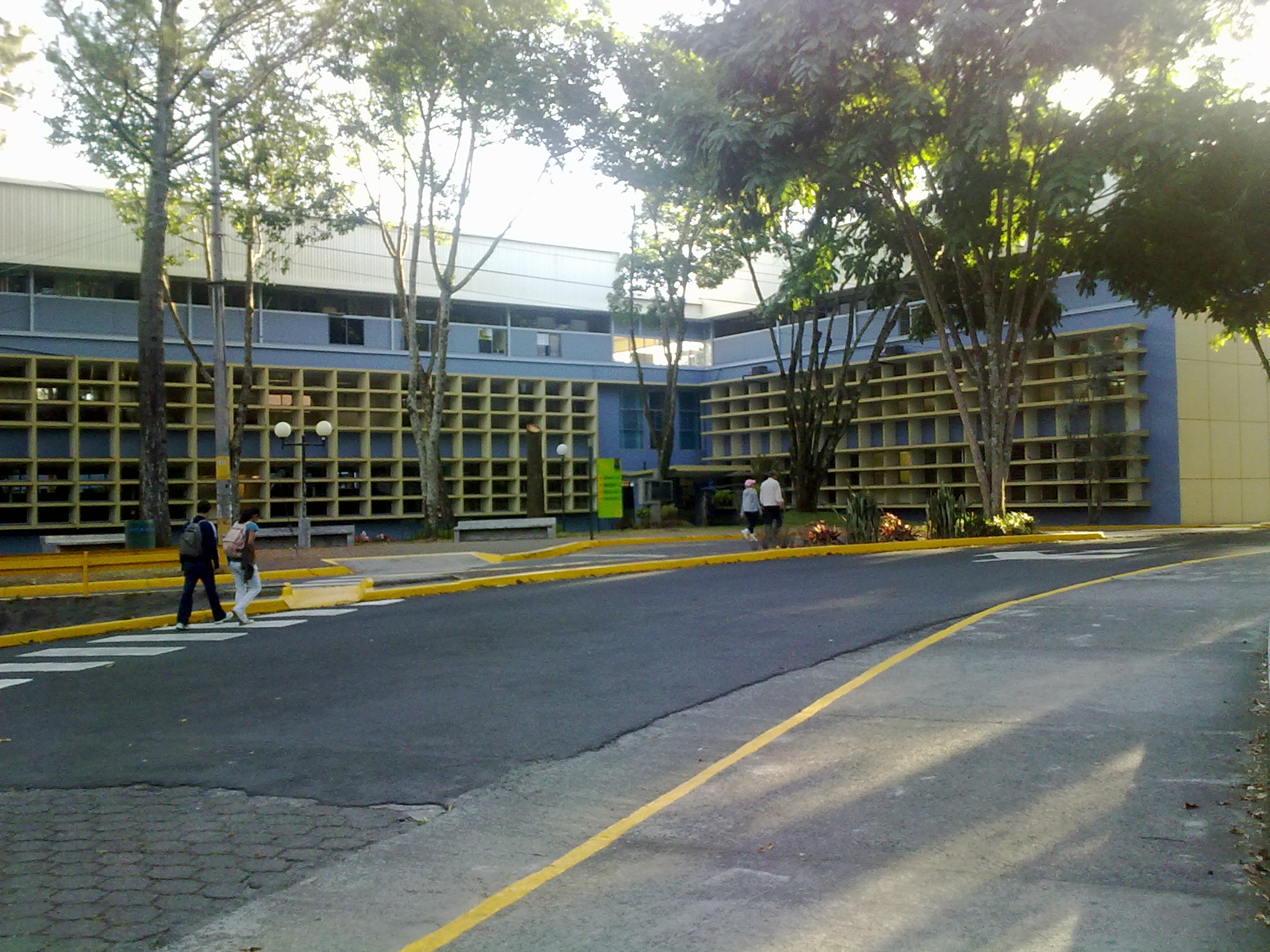 Facultad de Ingeniería en la Ciudad Universitaria Rodrigo Facio.